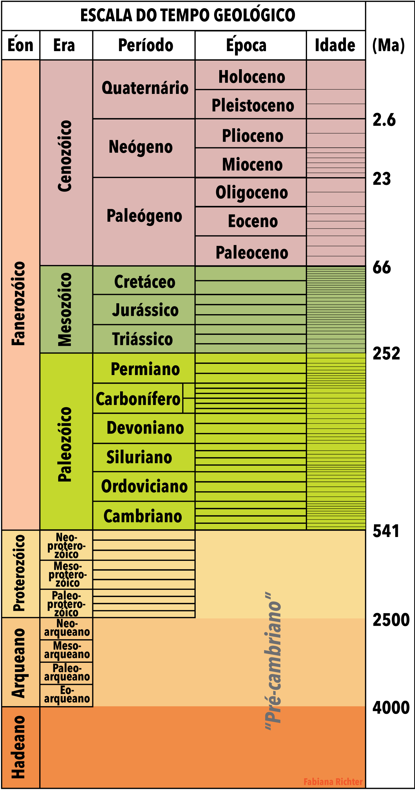 Escala do tempo geológico simplificada, mostrando os éons, eras, e as divisões de períodos, épocas e idades.